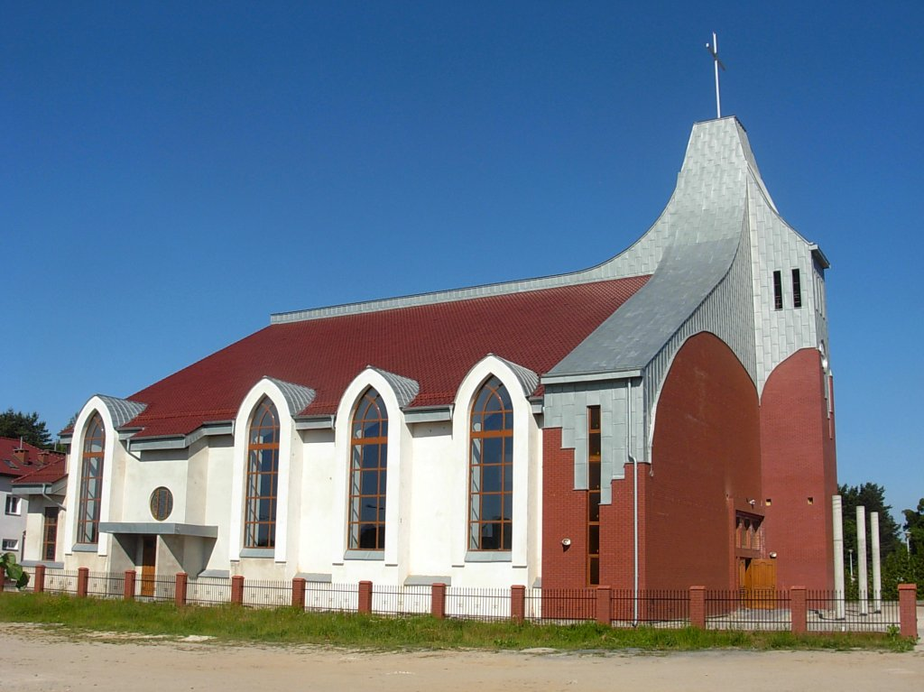 Kościół Wniebowstąpienia Pańskiego w Bydgoszczy